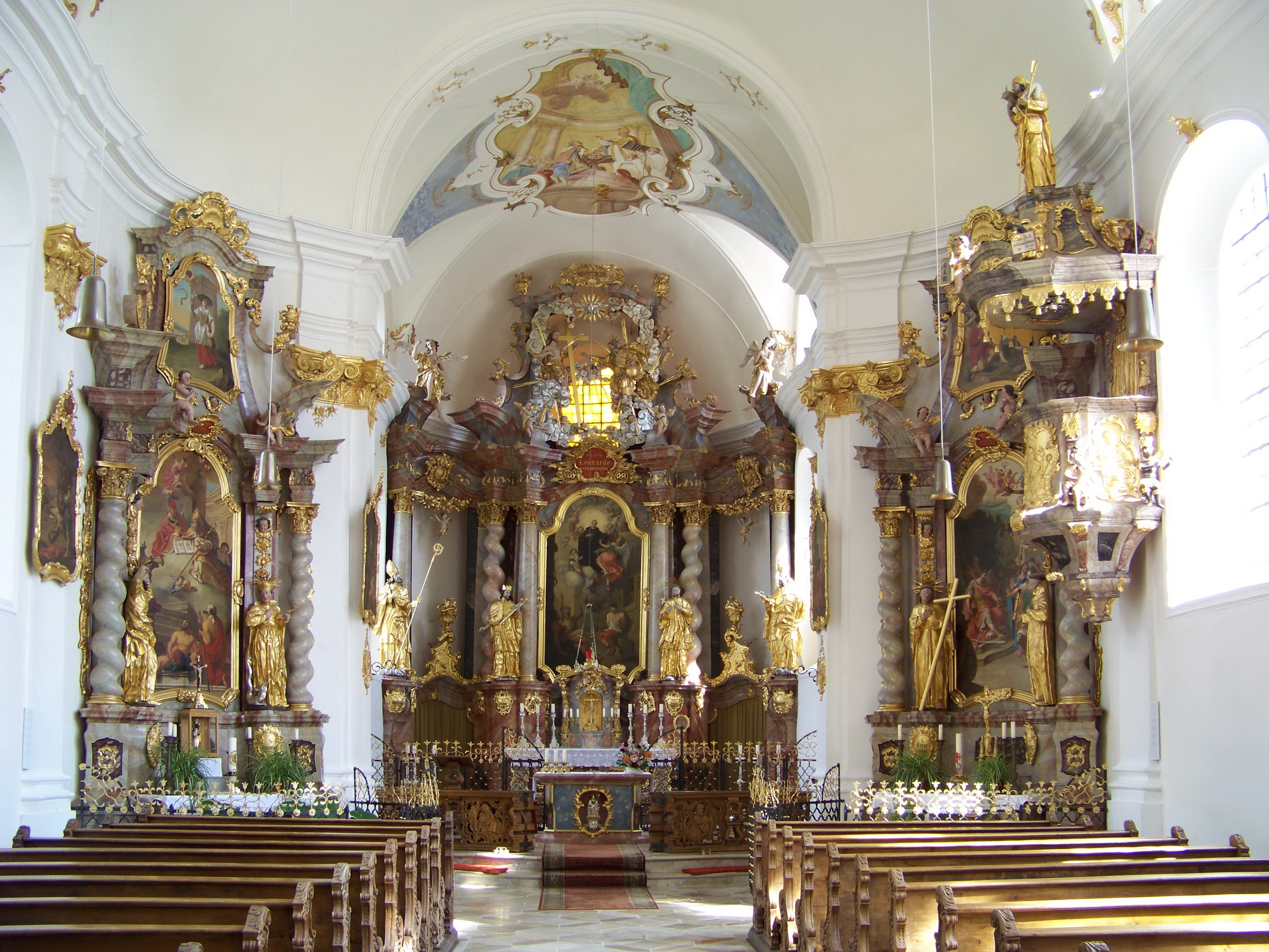 Rottenburg an der Laaber. Oberotterbach, Leonhardistraße 12. Wallfahrtskirche St. Leonhard. Innenraum. Langhaus mit drei Jochen und abgerundeten Ecken. Chor mit zwei Jochen und Halbkreisschluss. Im Chor und Langhaus Tonnengewölbe.